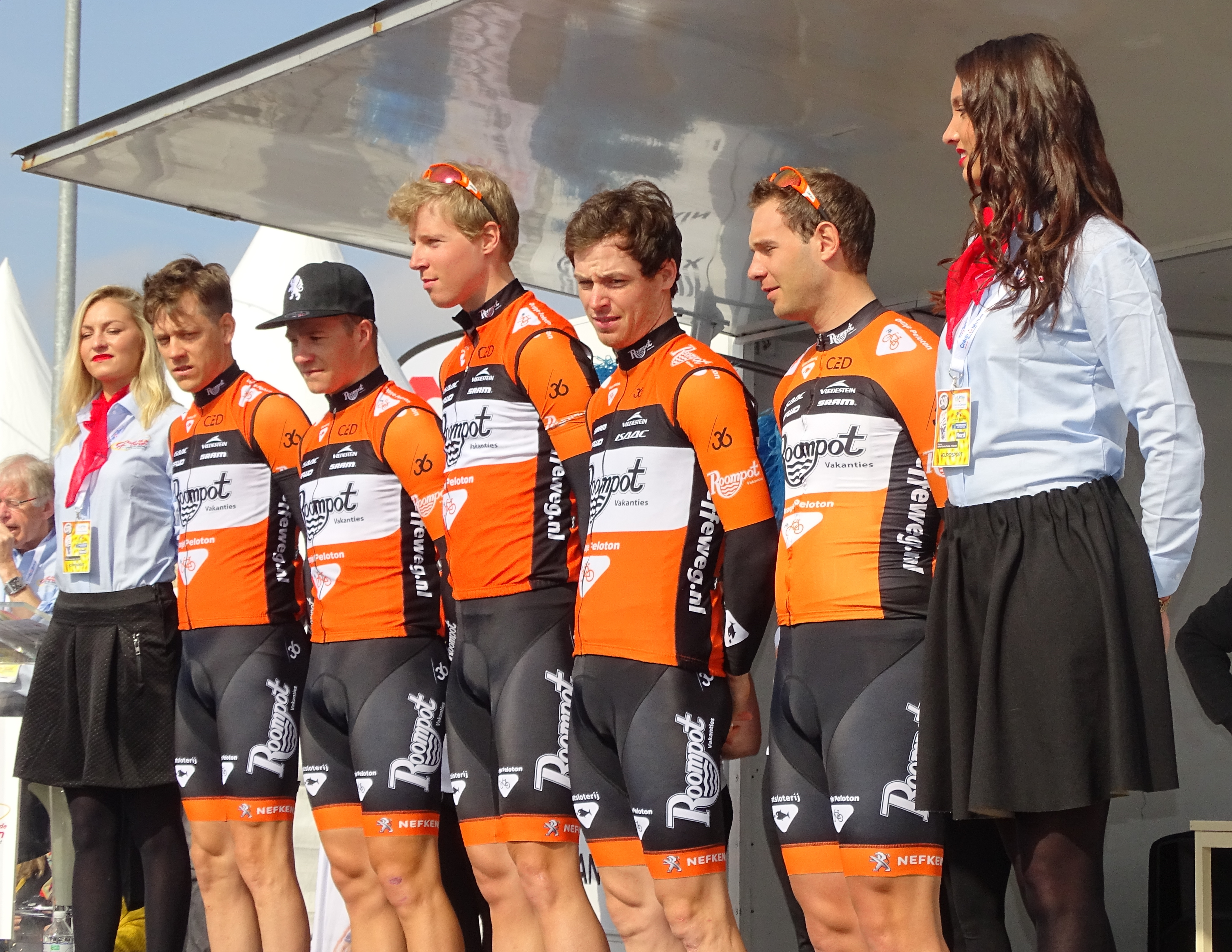 Reportage réalisé le jeudi 14 avril à l'occasion du départ et de l'arrivée du Grand Prix de Denain 2016 à Denain, Nord, Nord-Pas-de-Calais-Picardie, France.